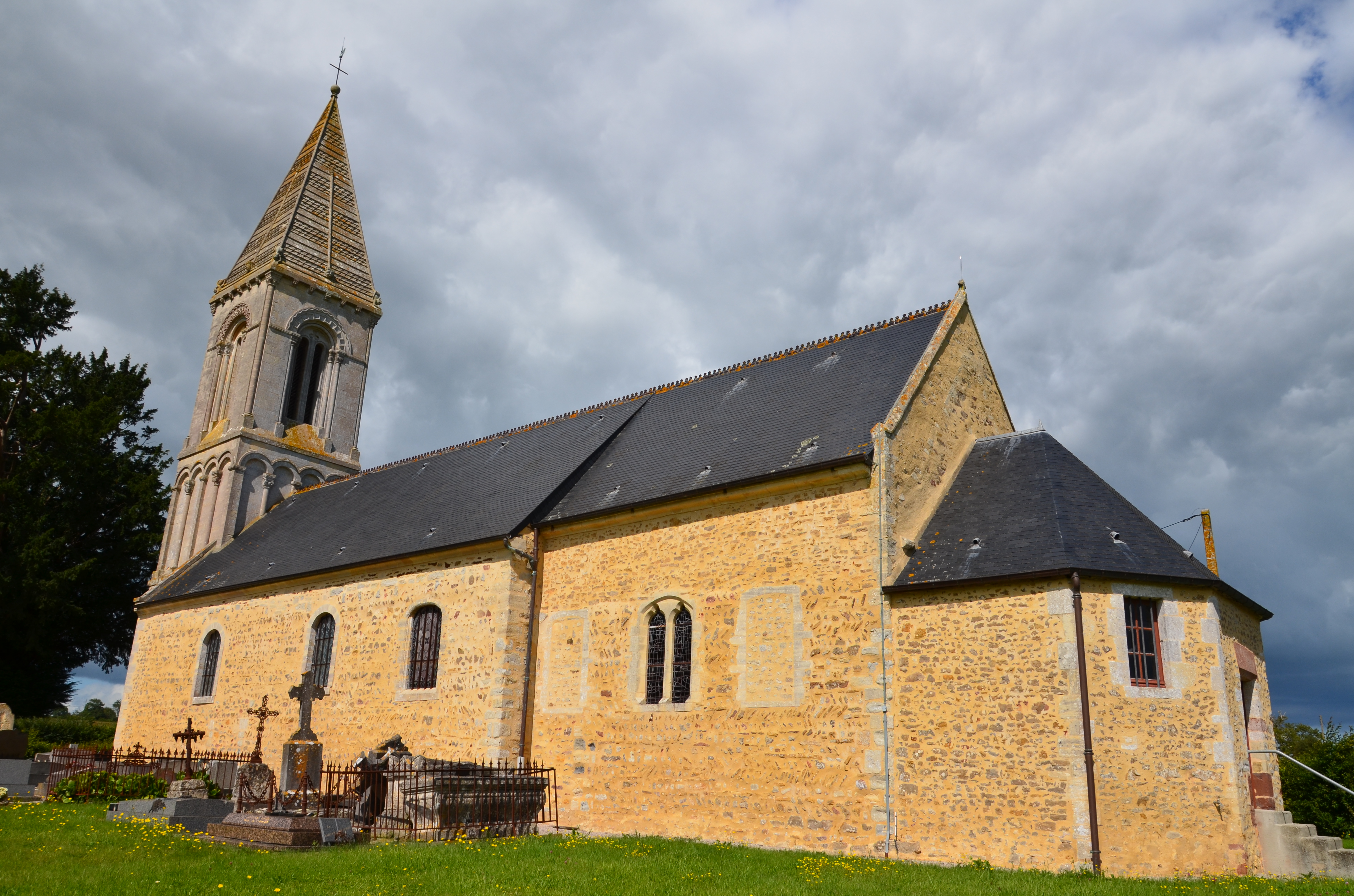 Église Saint-Marcouf de Saint-Marcouf. .